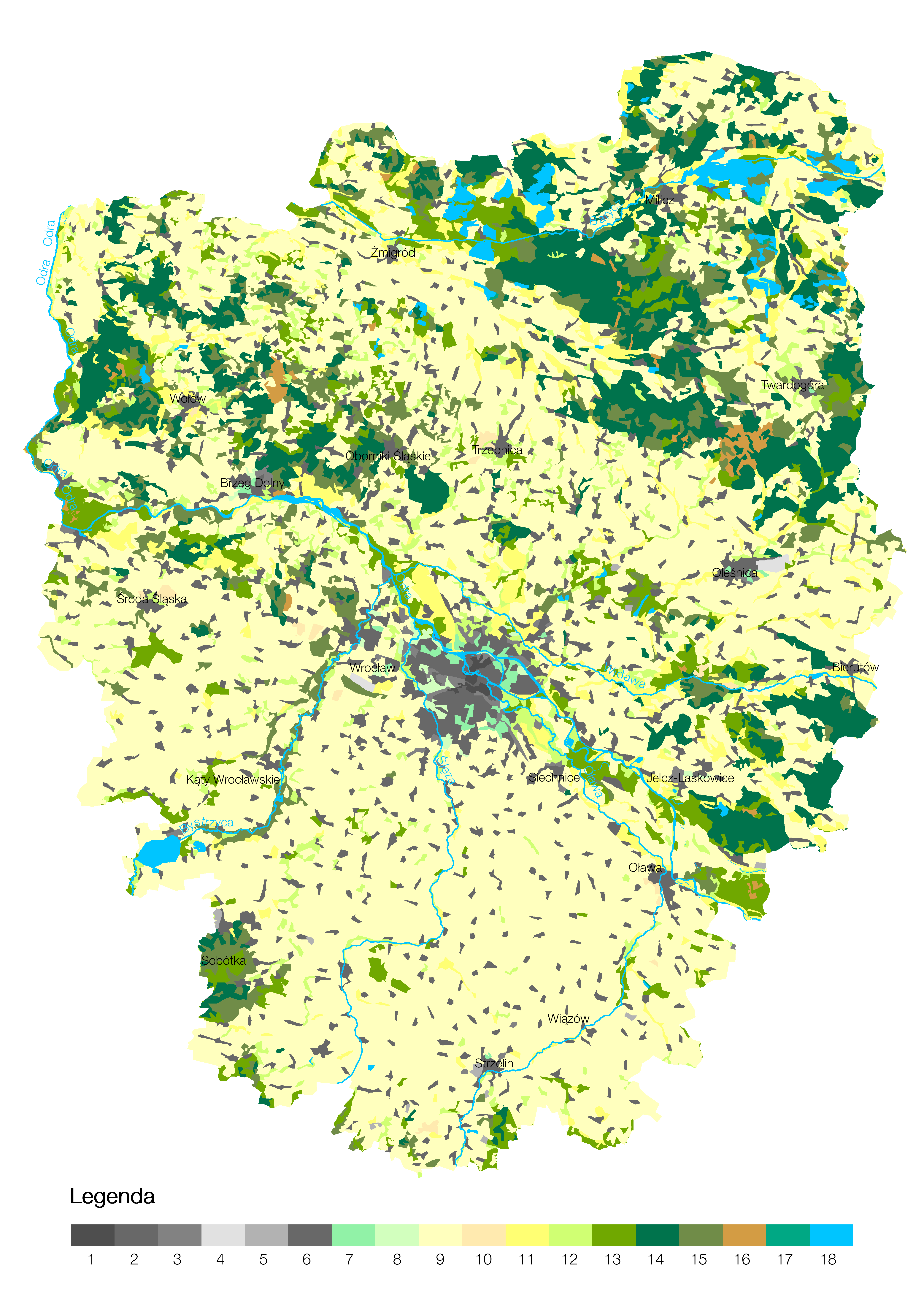 Pokrycie terenu województwa wrocławskiego (1975-1998) w 1998 roku